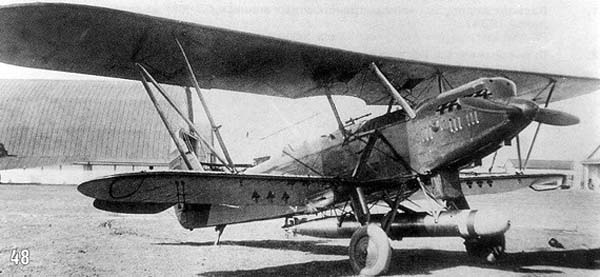 Серийный Р-5Т.